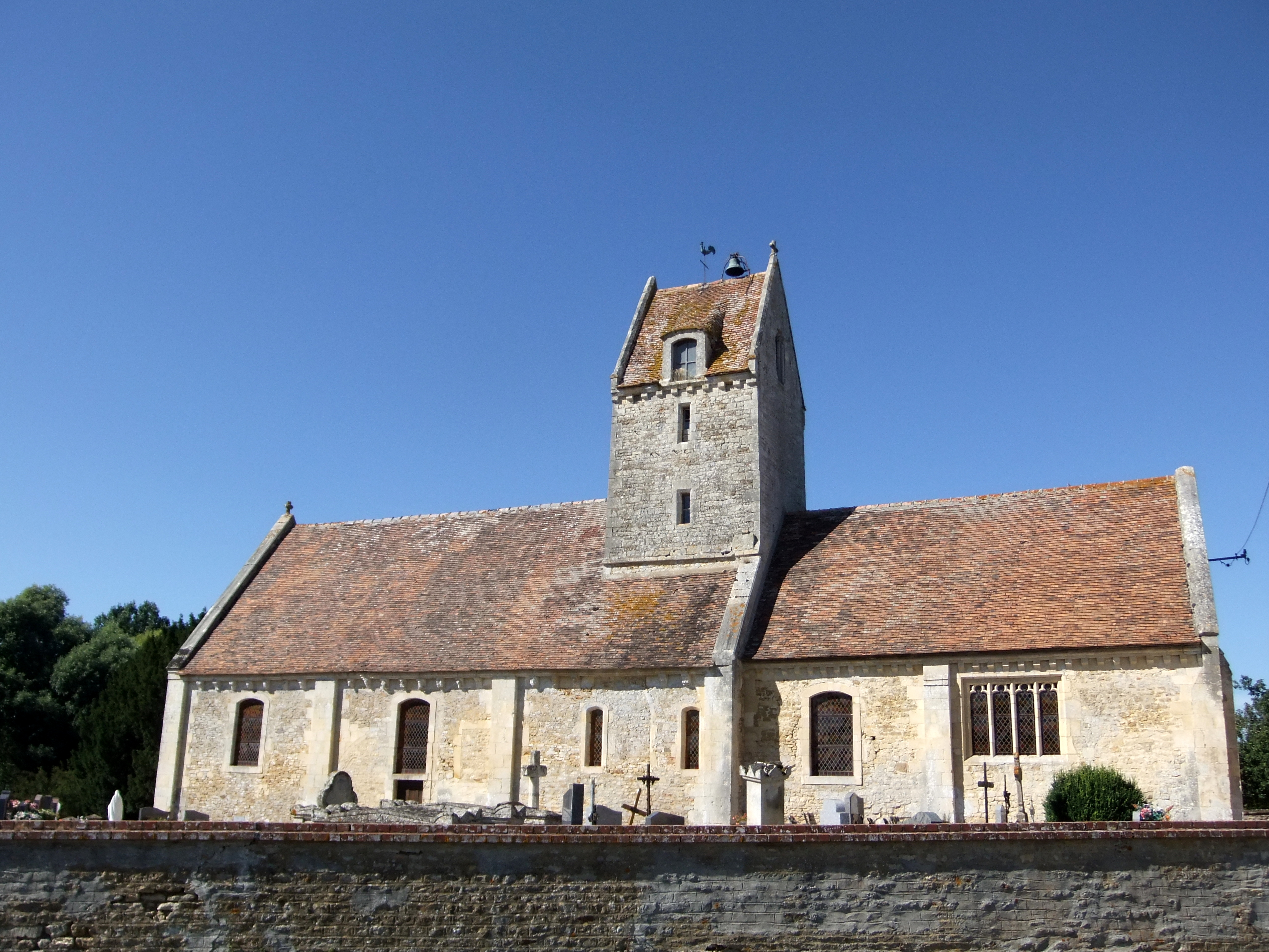 Eglise Saint-Quentin .